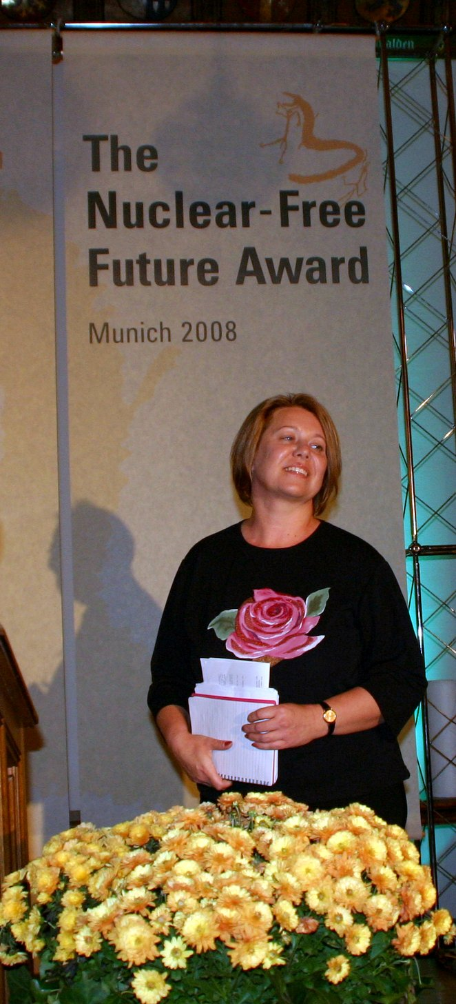 Jillian Marsh, promovierte Umweltaktivistin und Mitglied der Australian Nuclear Free Alliance (ANFA). Hier am 24. Oktober 2008 während der Preisverleihung des Nuclear Free Future Award 2008 im Saal des Alten Rathauses in München. Jillian Marsh wurde am Abend des 24. Oktober 2008 der Preis der in München ansässigen Nuclear-Free Future Award Foundation verliehen. Titel des Werks: "Jillian Marsh, Preisträgerin des Nuclear Free Future Award 2008 am 24. Oktober 2008 in München (Preisverleihung)".